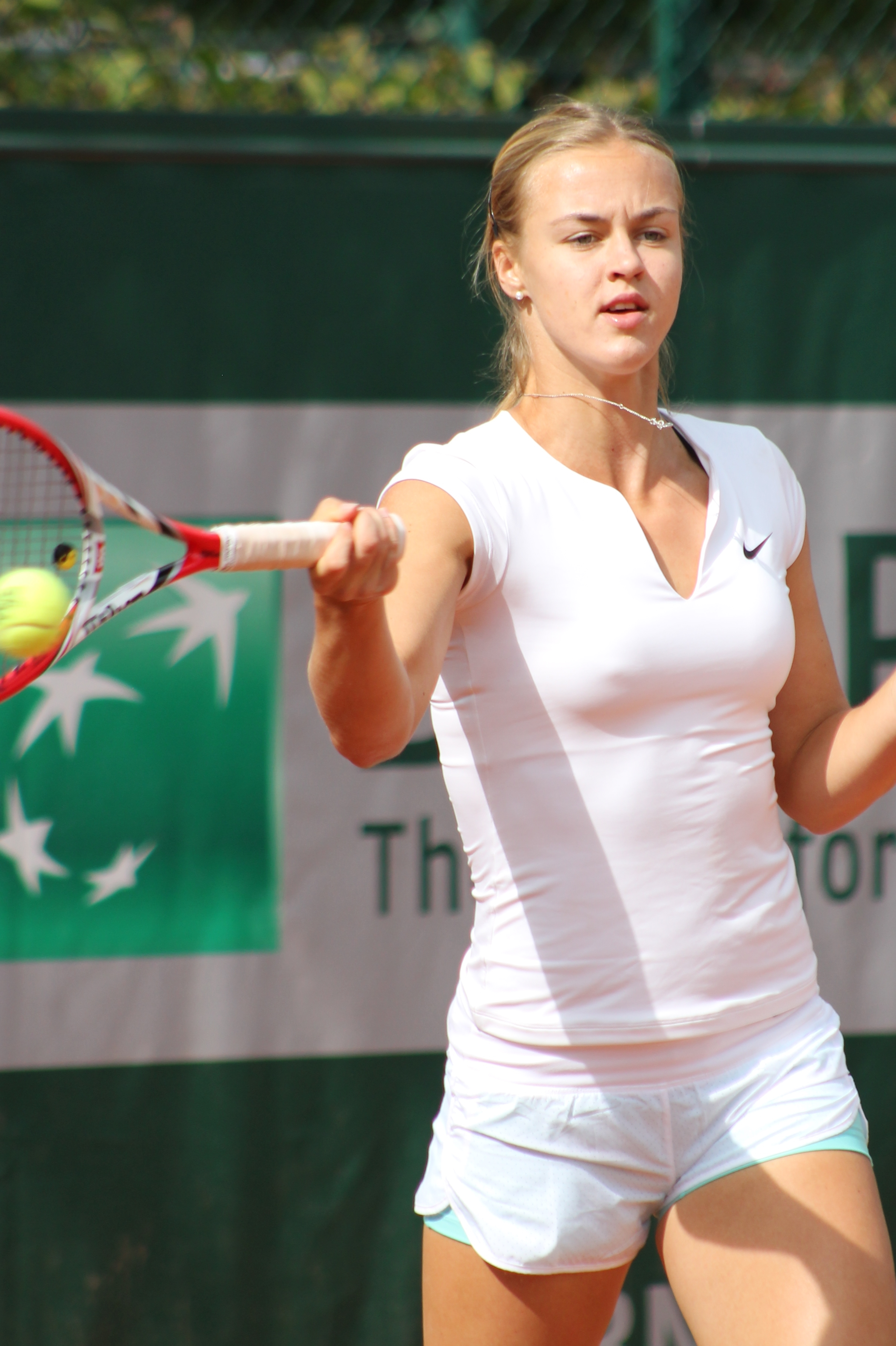 Schmiedlova RG15 (10)